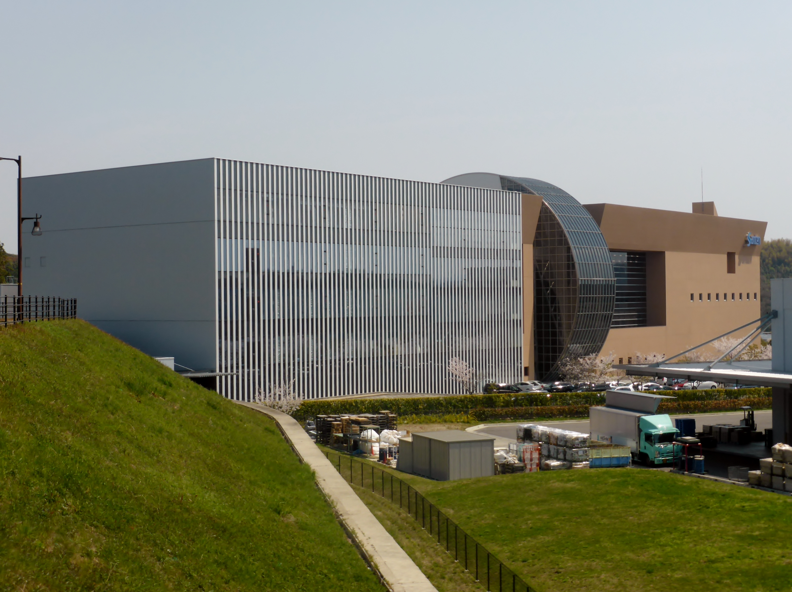 参天製薬奈良研究開発センターを撮影。